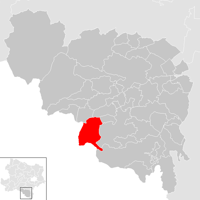 Bezirk Neunkirchen